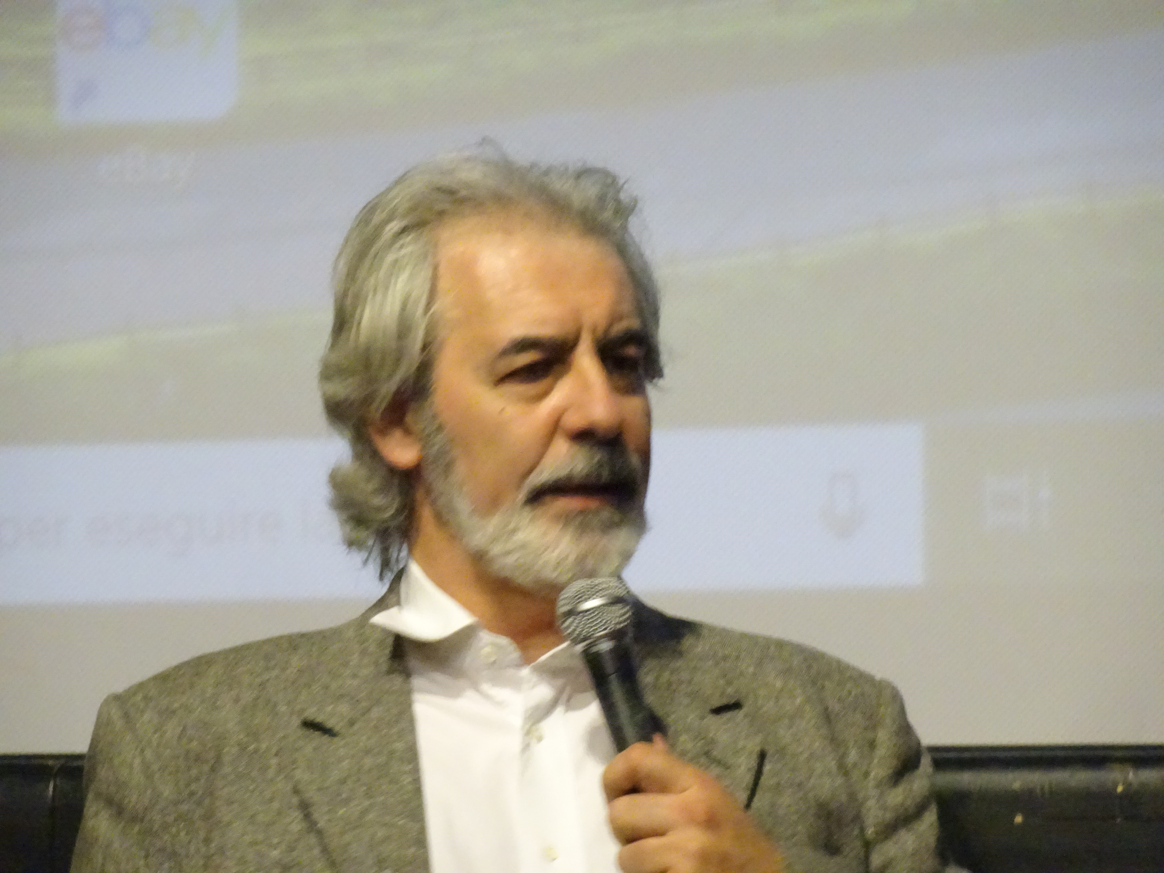 Il presidente della Festival del Viaggio alla presentazione Wiki Loves Monuments a Firenze 31 maggio 19 conn ANCI, Toscama Promozione